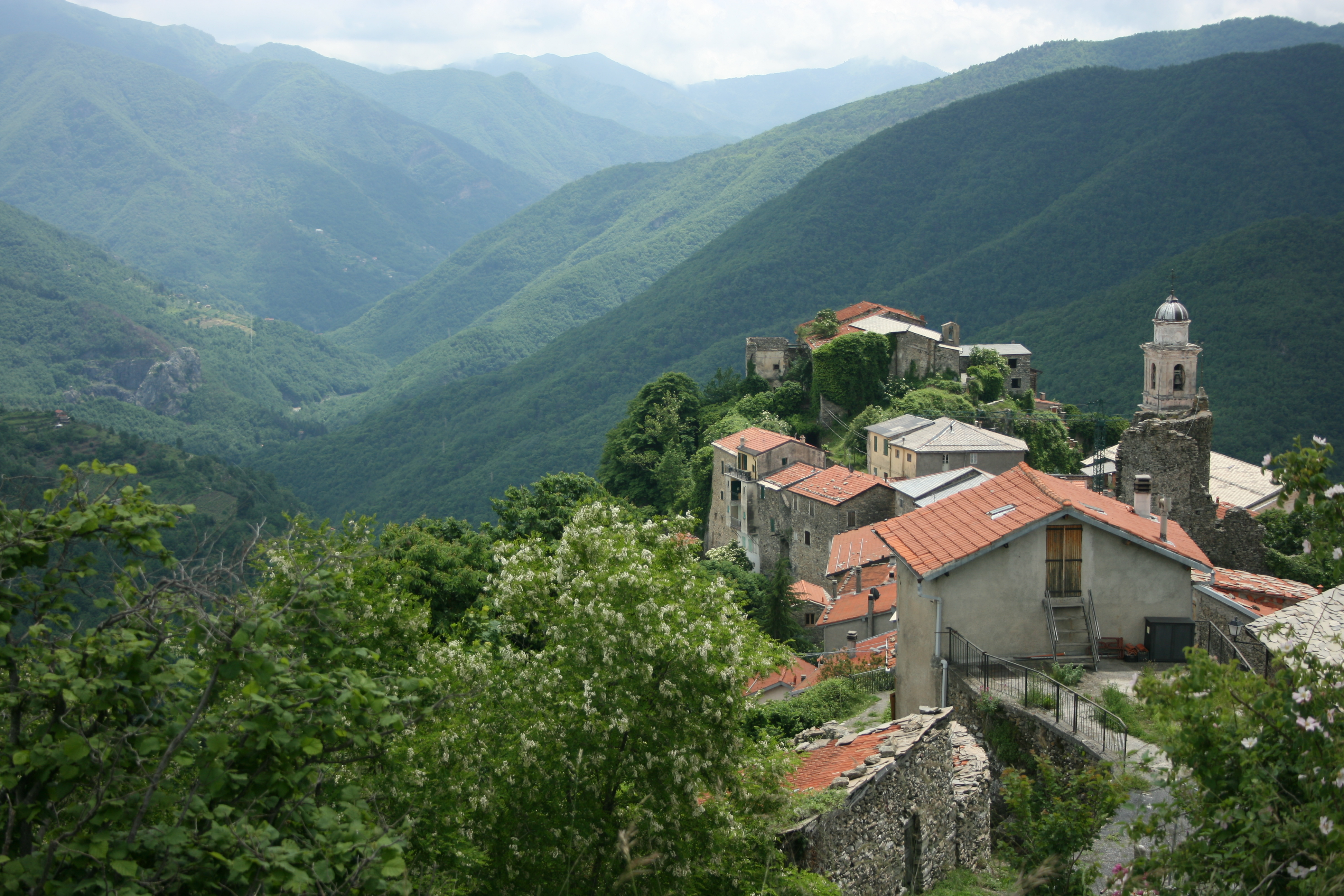 Triora (IM)